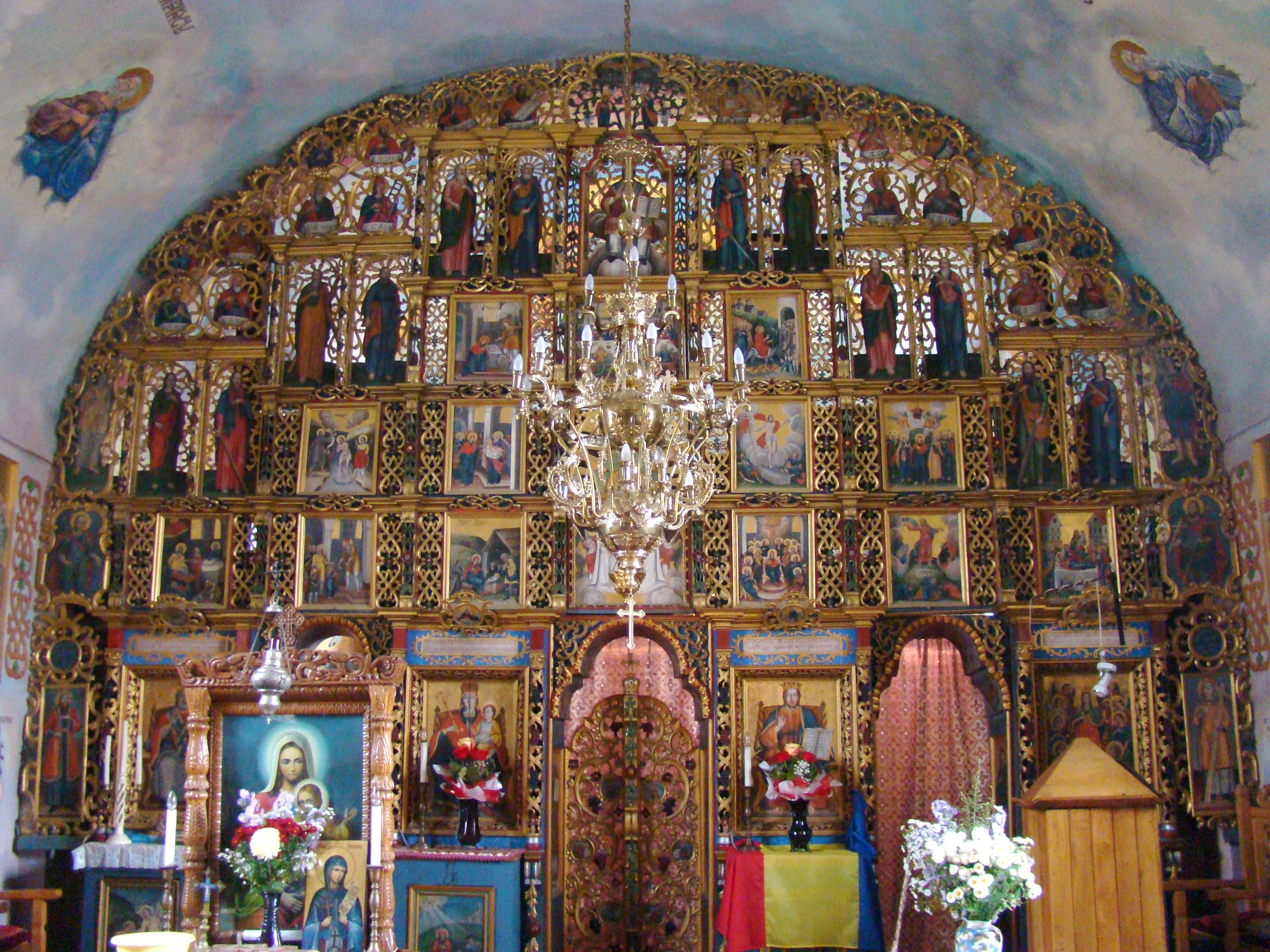 Biserica "Cuvioasa Paraschiva", sat Cetățele; comuna Șișești 01